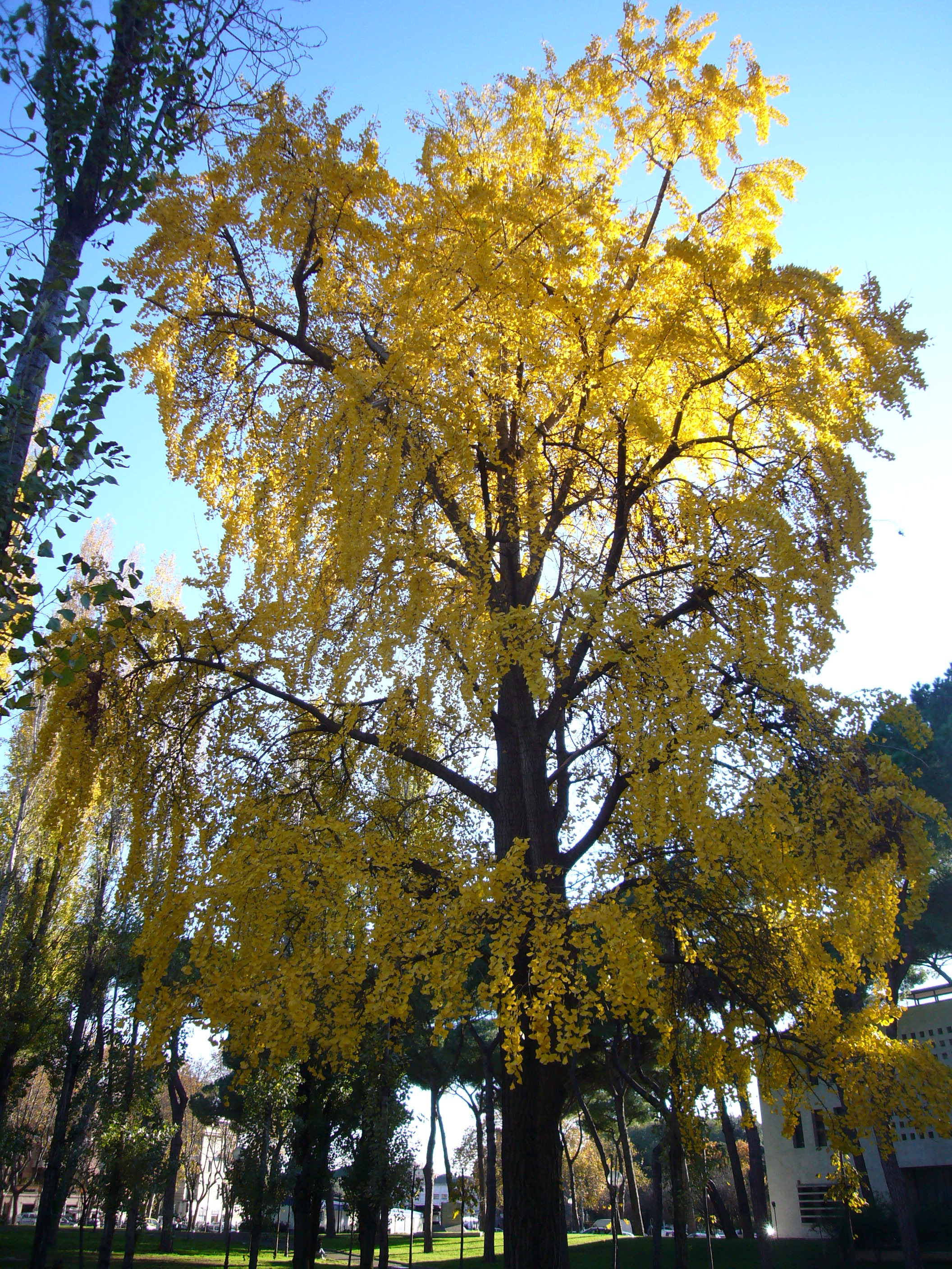 Roma, Ginko biloba autunnale al Parco della Resistenza